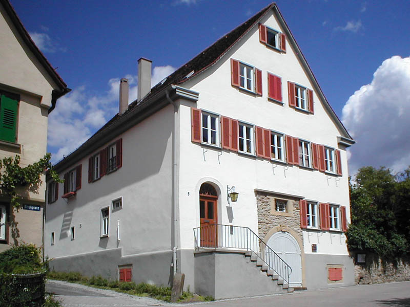 Pfarrhaus bei der Kirche in Löchgau